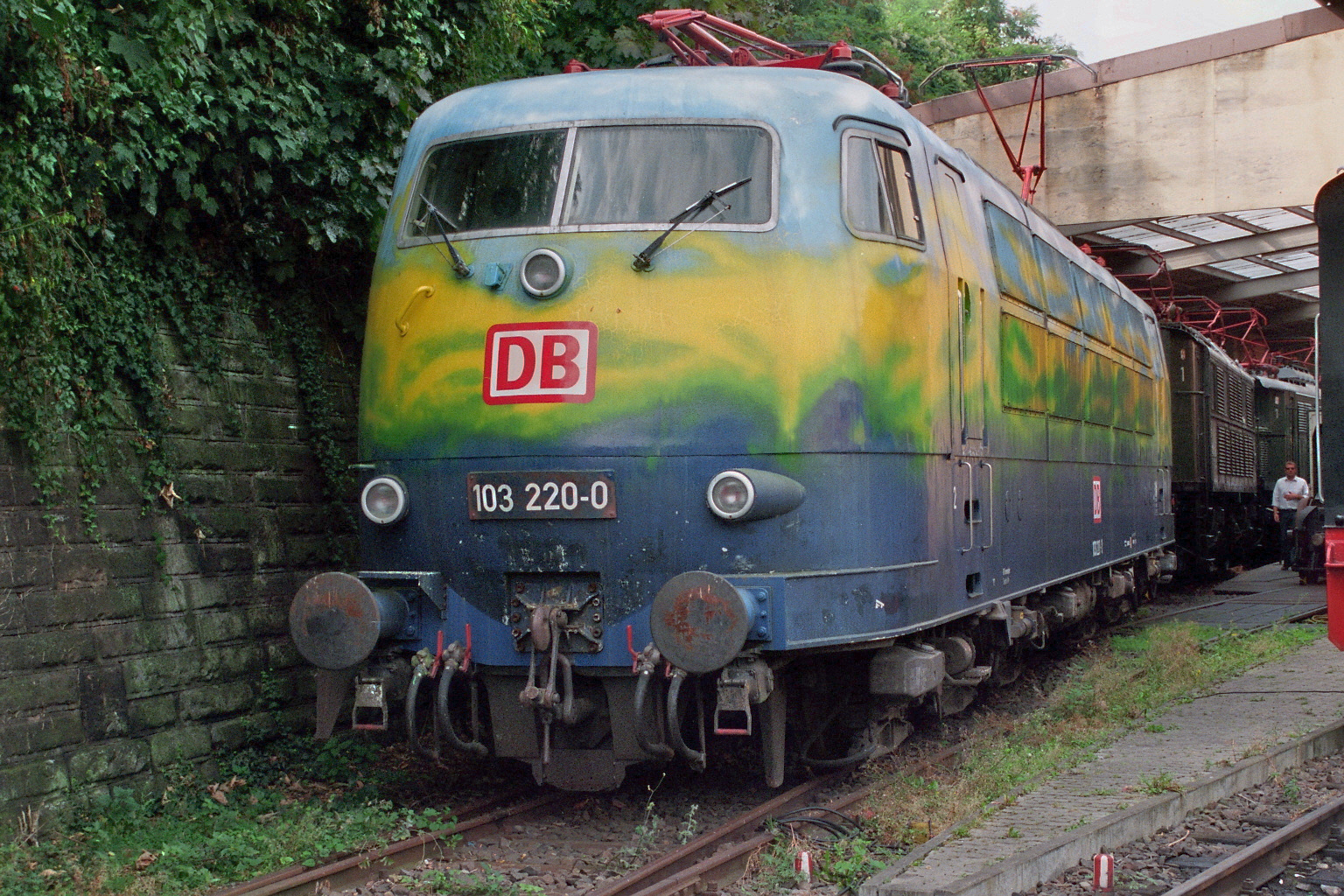 103-220-0 am 20.09.2009 im Eisenbahnmuseum Neustadt/Weinstraße